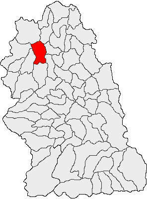 Categorie:Hărţi ale judeţului Hunedoara